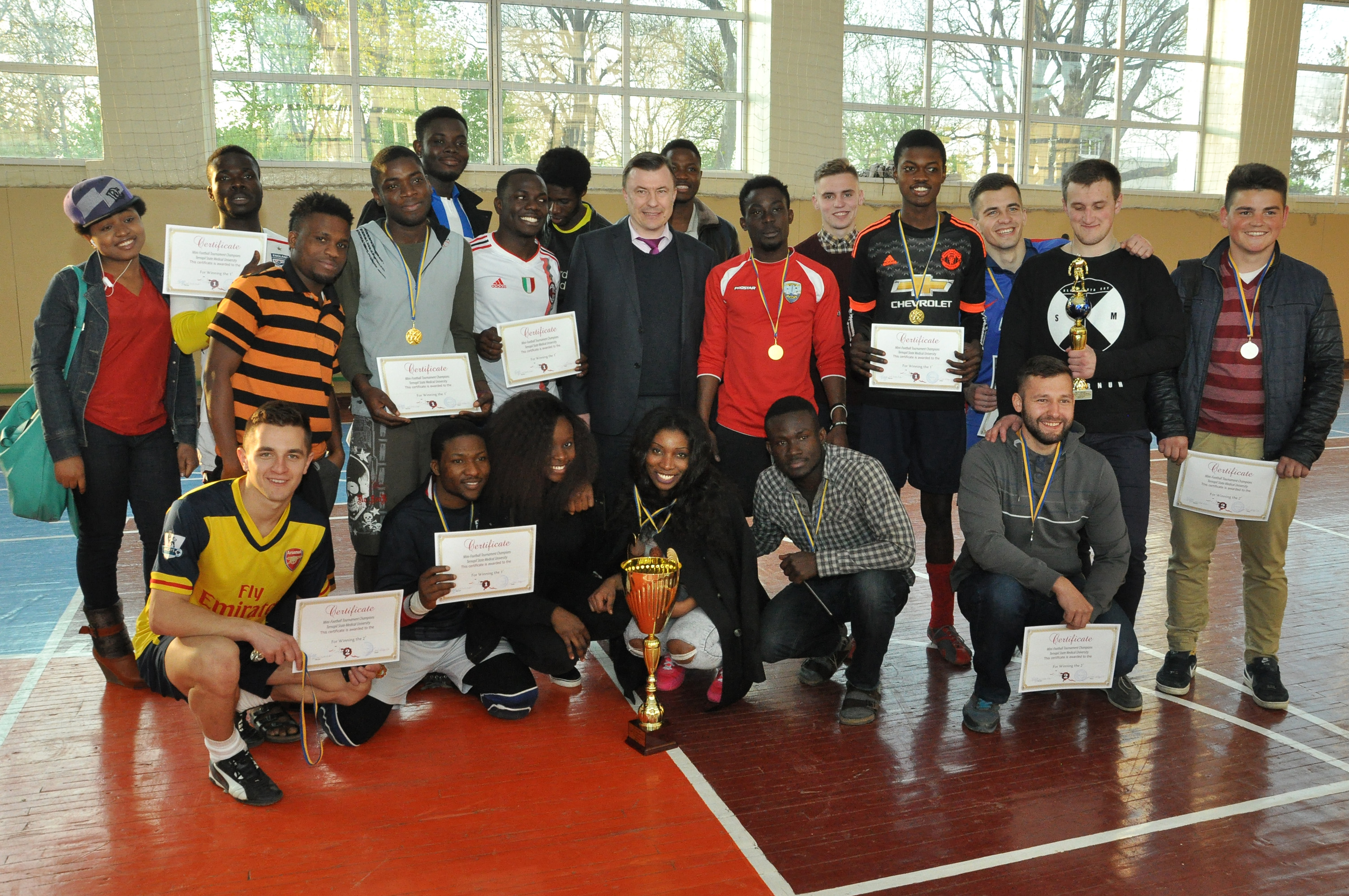 Міні-футбол «Ліга чемпіонів» Тернопільського державного медичного університету імені І. Я. Горбачевського. Півфінальні та фінальний поєдинки 26 квітня 2016 року. Переможці з деканом факультету іноземних студентів Петром Сельським.